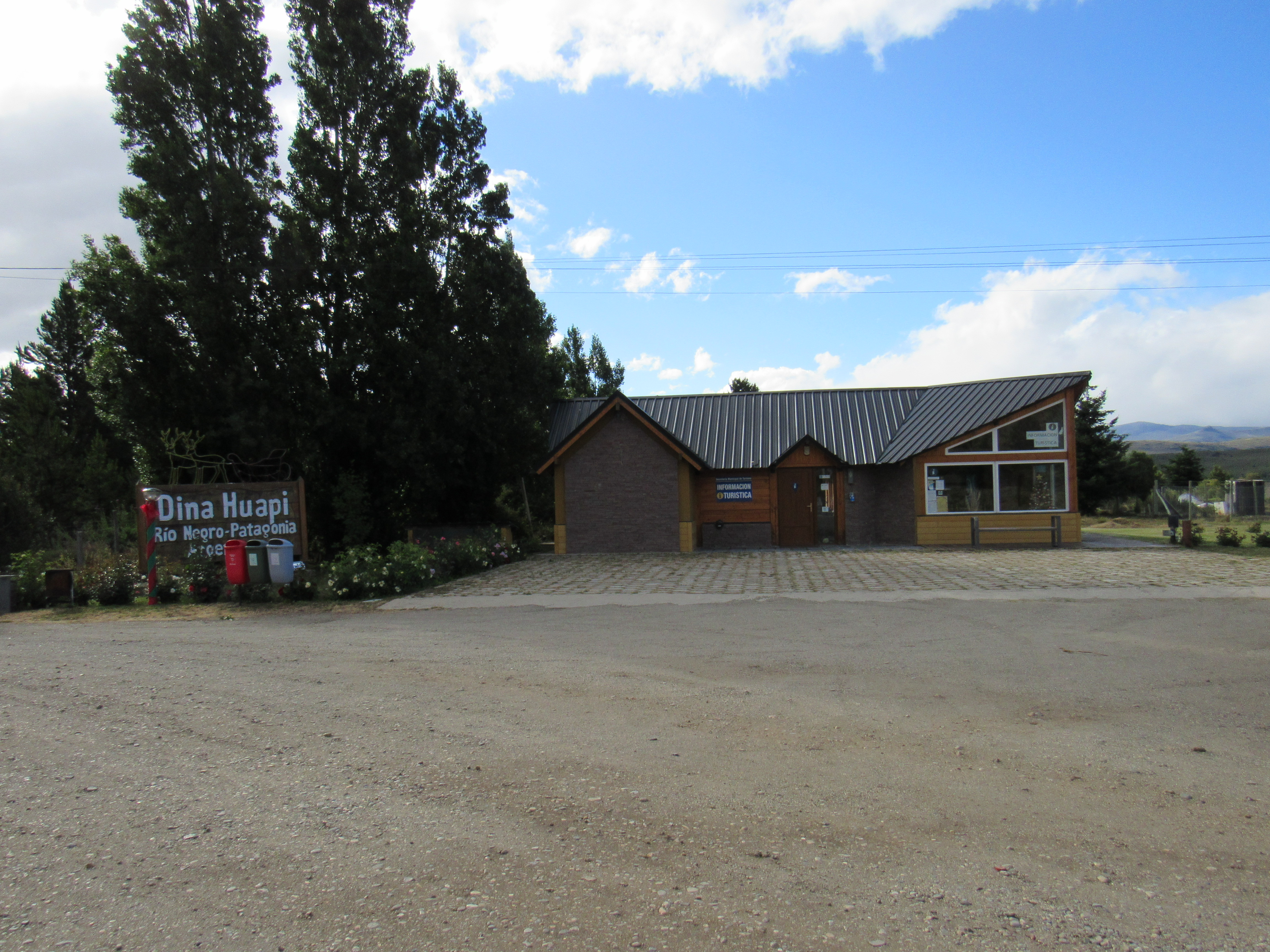 Dina Huapi, Río Negro, Argentina